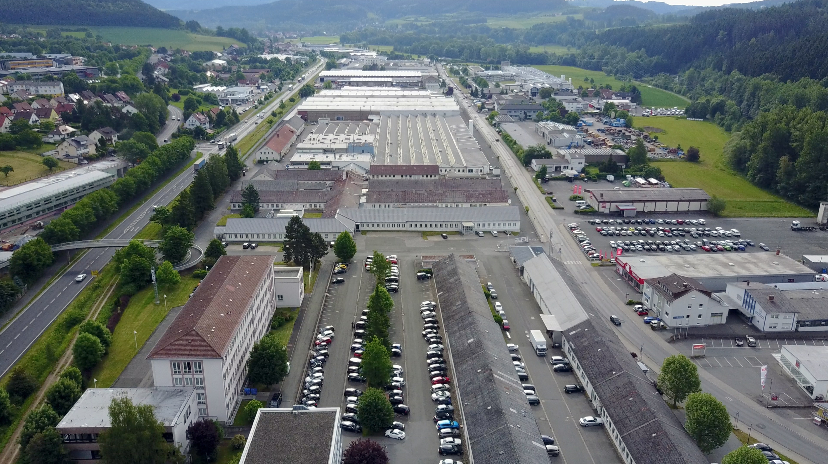 Das Werksgelände der Loewe Technologies GmbH